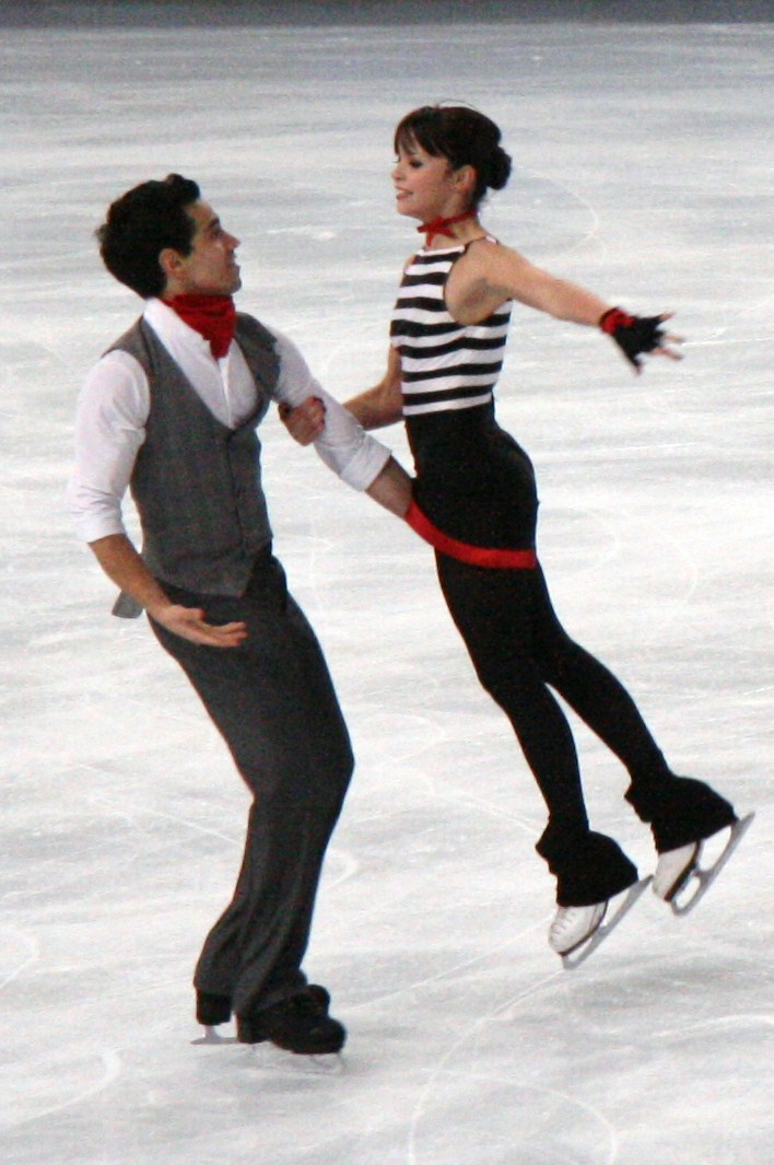 Анна Каппеллини и Лука Ланотте на 2011 Trophée Eric Bompard